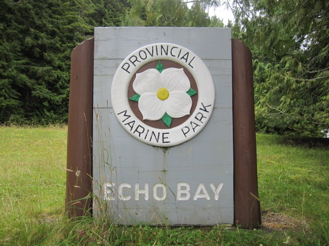 Echo Bay Marine Provincial Park-Schild